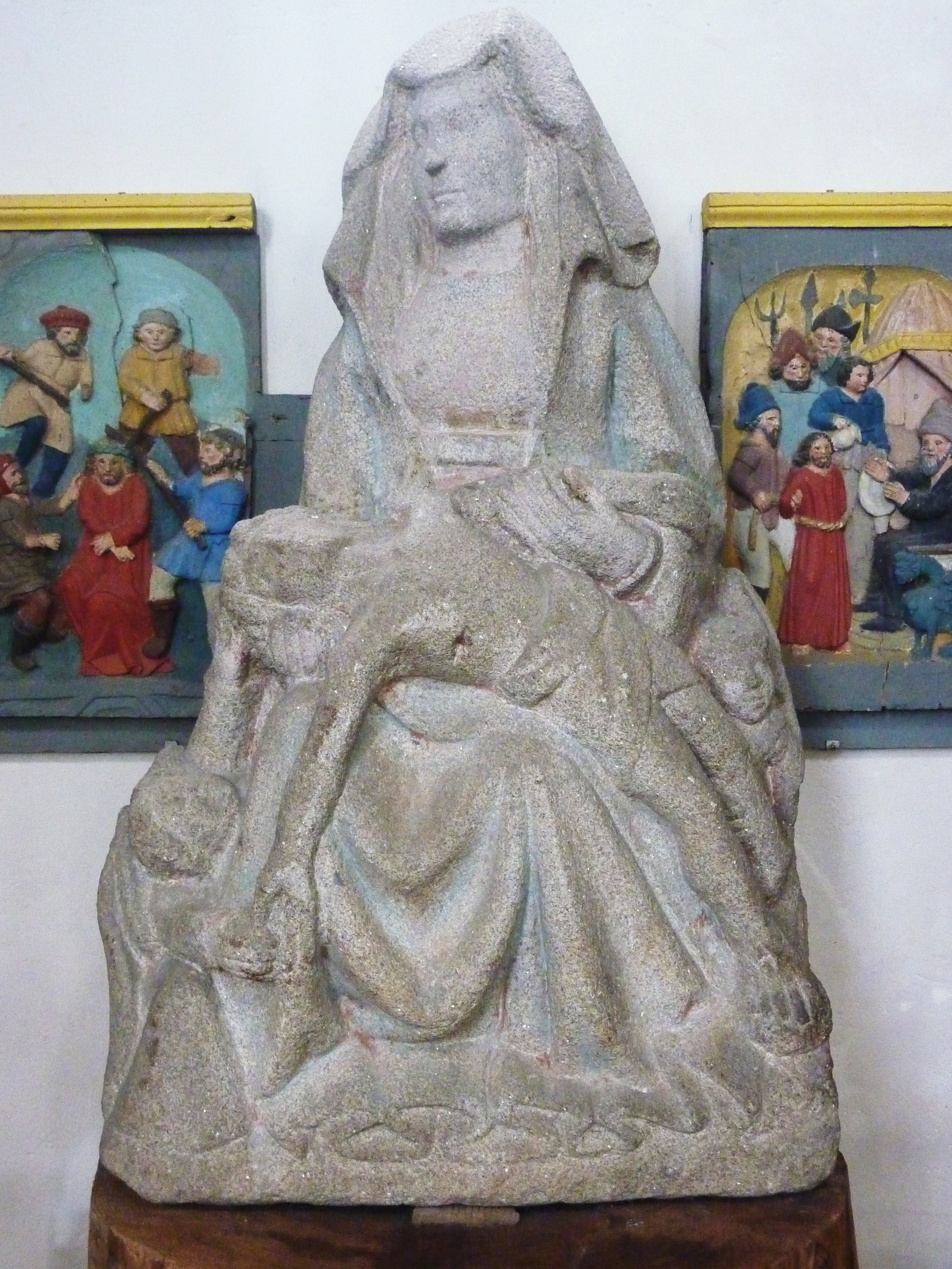 Carhaix-Plouguer : église Saint-Trémeur, Piétà en granite du milieu du XVe siècle